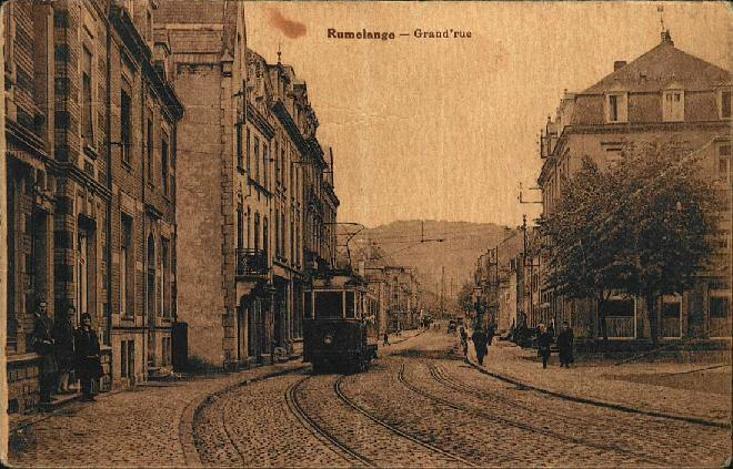 Rumelange, le Minettstram dans la Grand'rue, vers 1948. Carte postale, édition Ch. Arendt, Rumelange.